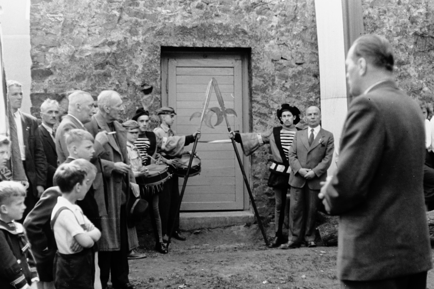 Uroczyste otwarcie Muzeum Regionalnego w Prudniku.